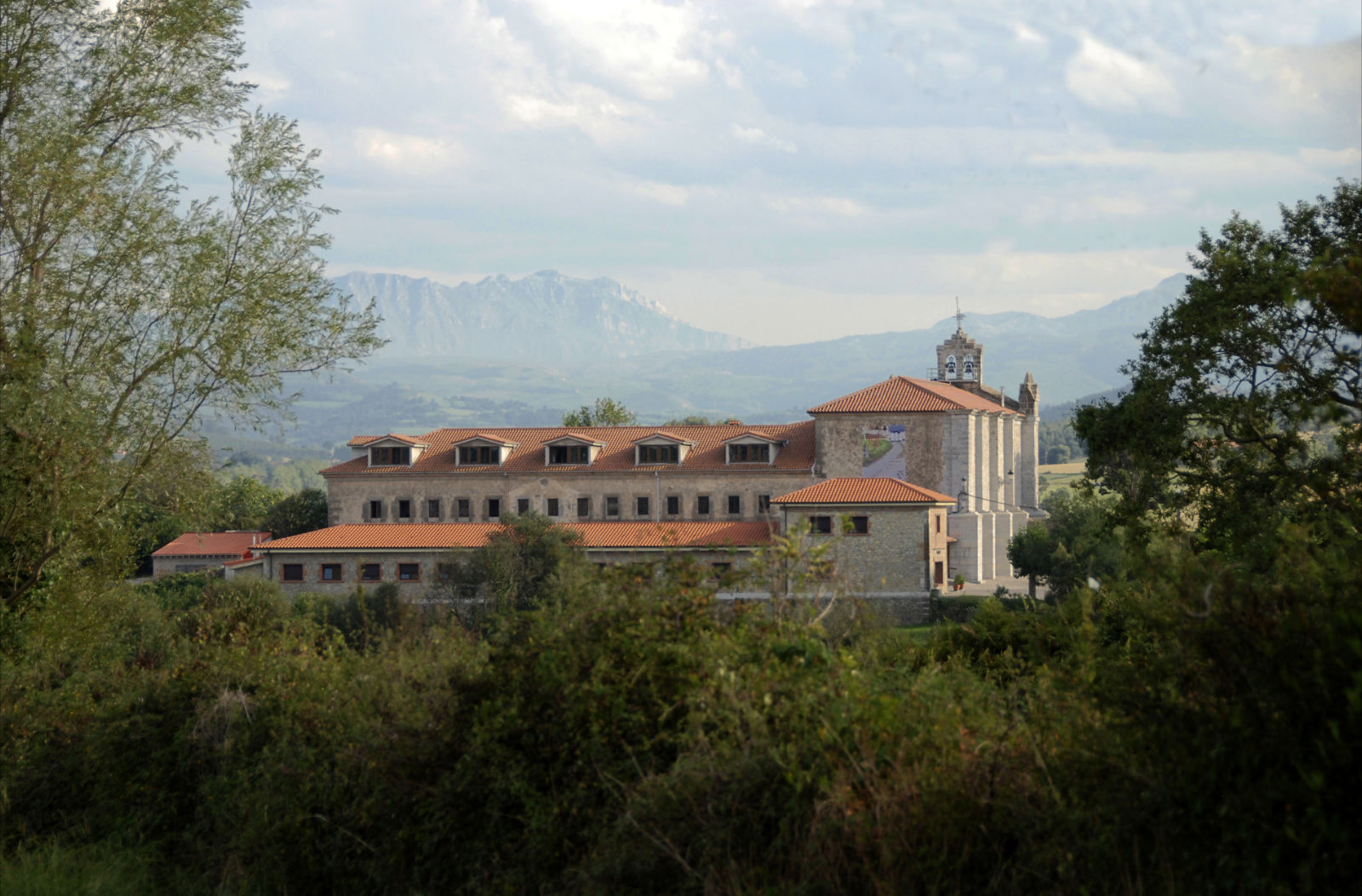 Monasterio de la Santísima Trinidad de Suesa, Cantabria